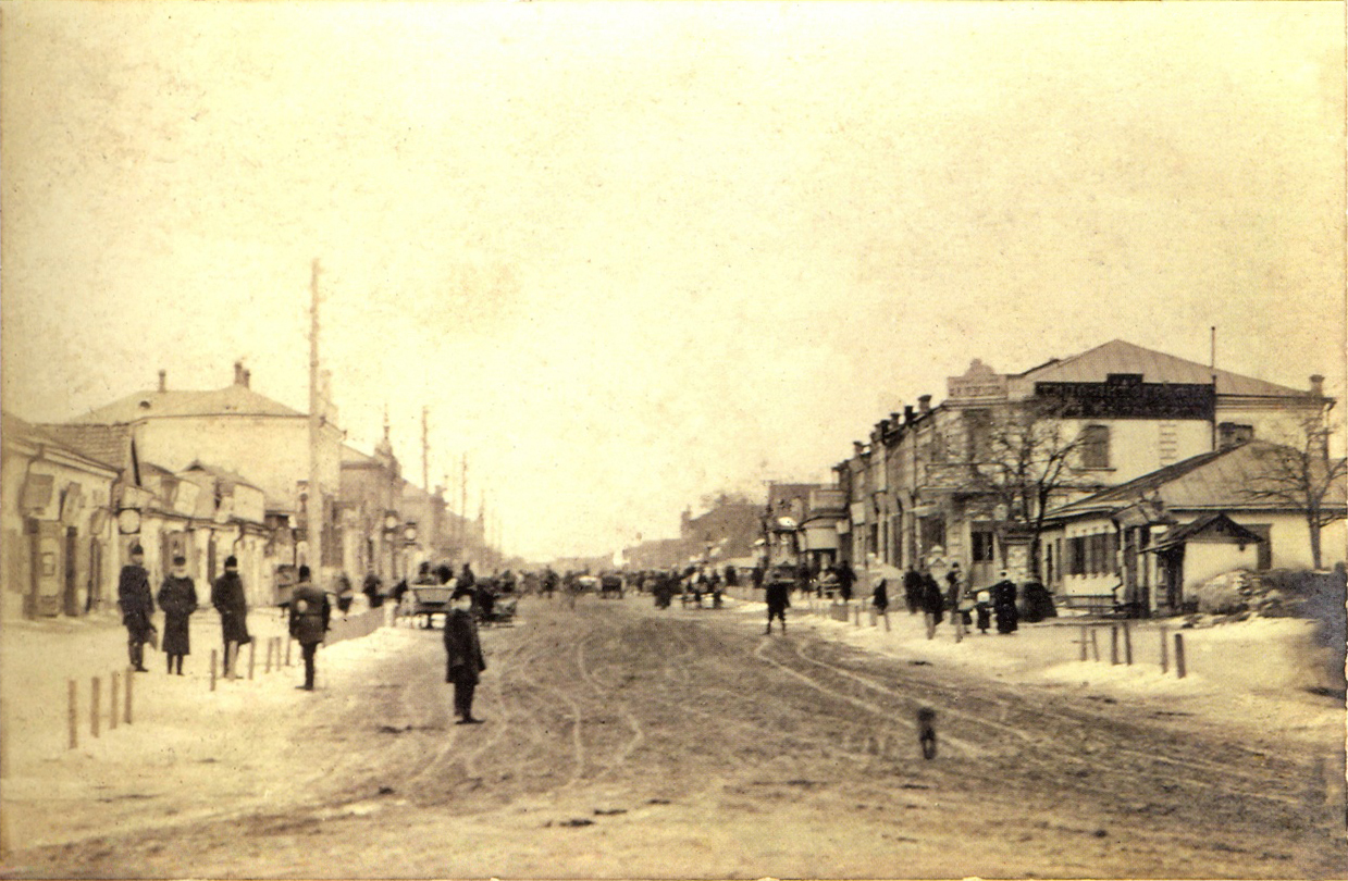 Кривой Рог. Почтовая улица. 1909 год